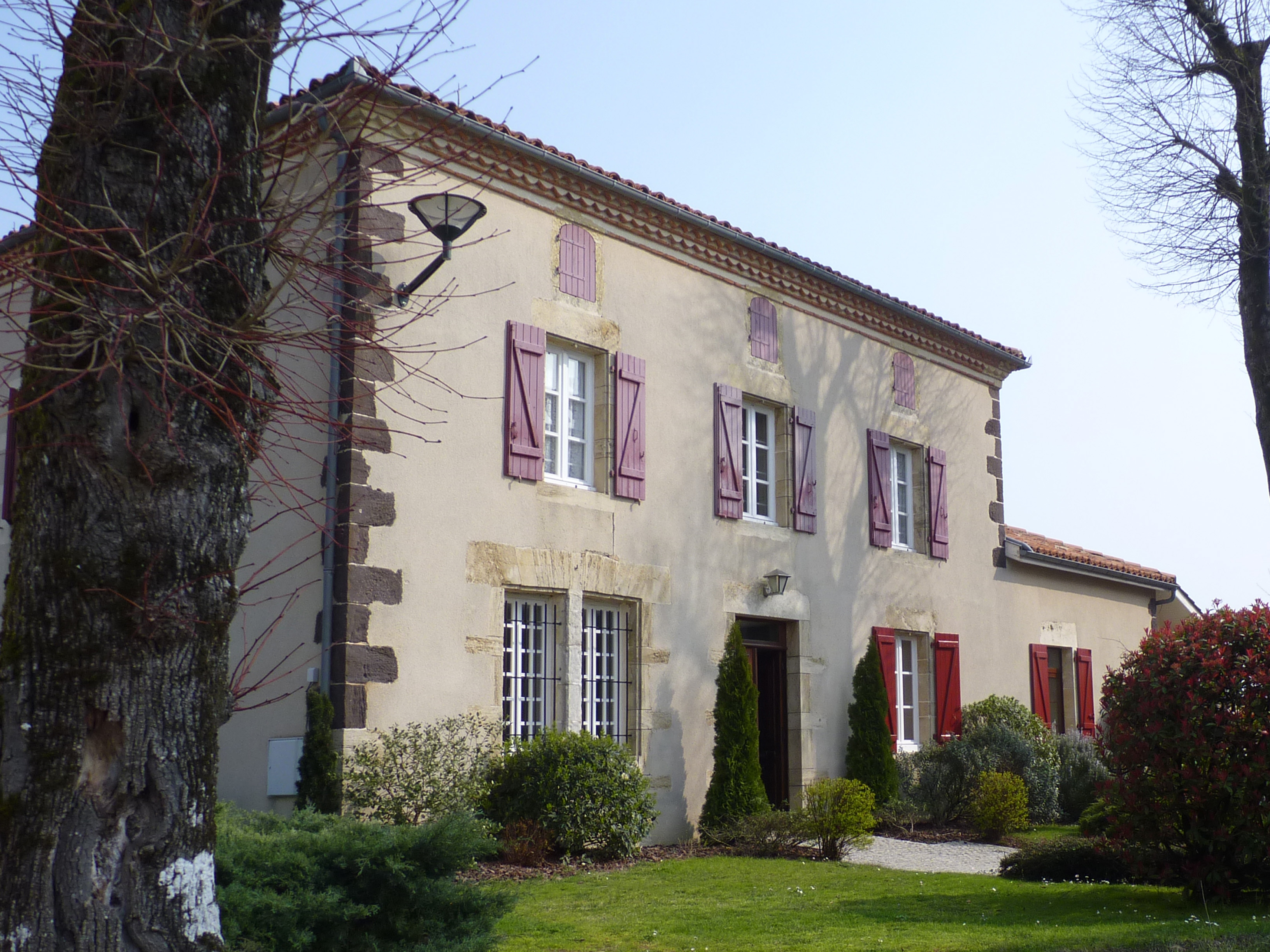 Mairie de Larbey